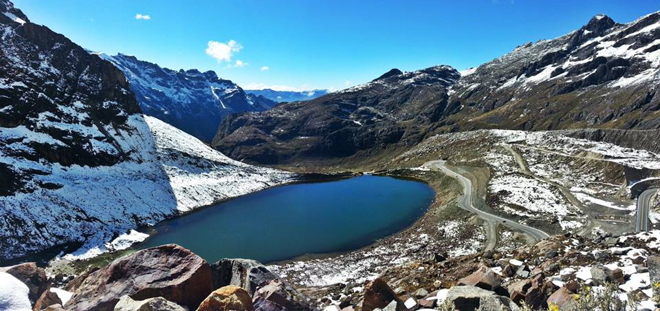 Laguna Belaunde en 2013